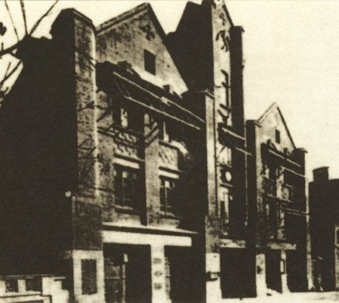 汉口俄国租界建筑。